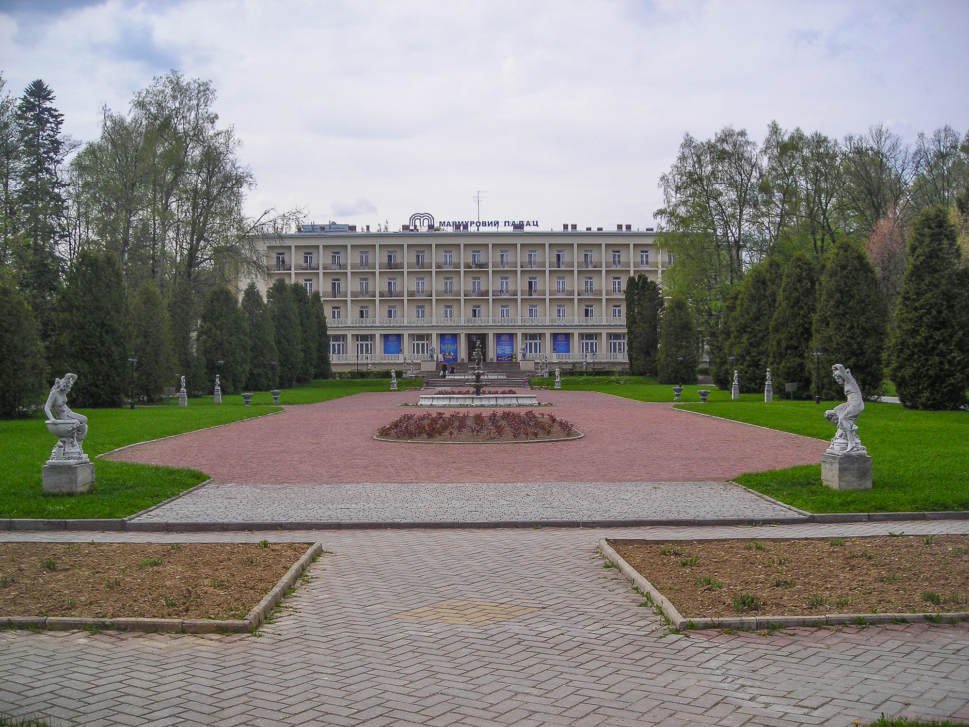 Палац (прим.: санаторій "Мармуровий палац"), Моршин, пл. Паркова